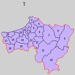 島根県美濃郡の町村制時点の町村。